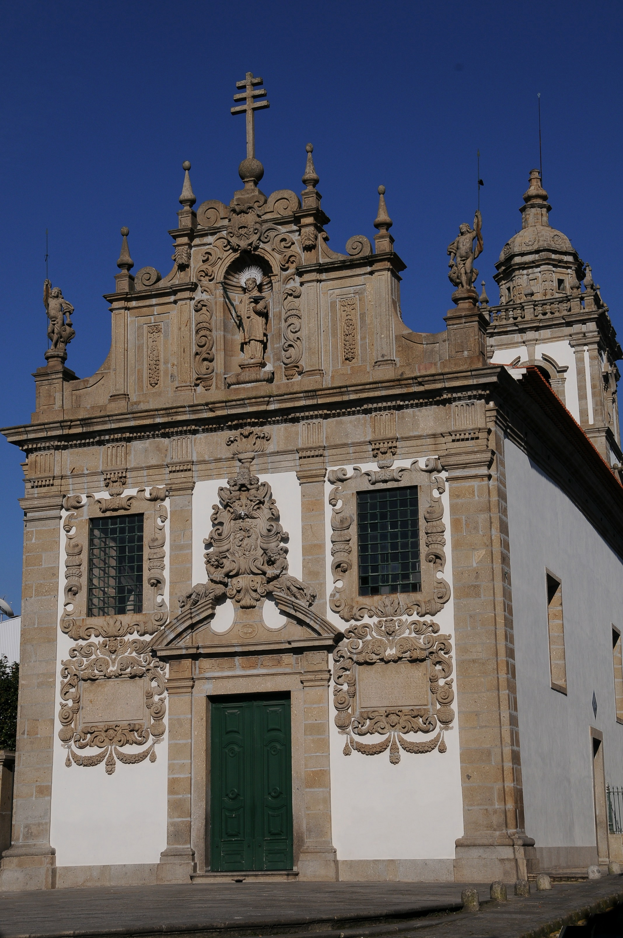 Foto da Igreja de S. Vicente em Braga, Portugal.